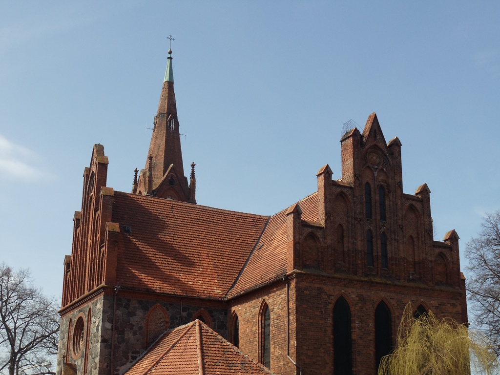 Anteny nadawcze Radia Plus Lipiany